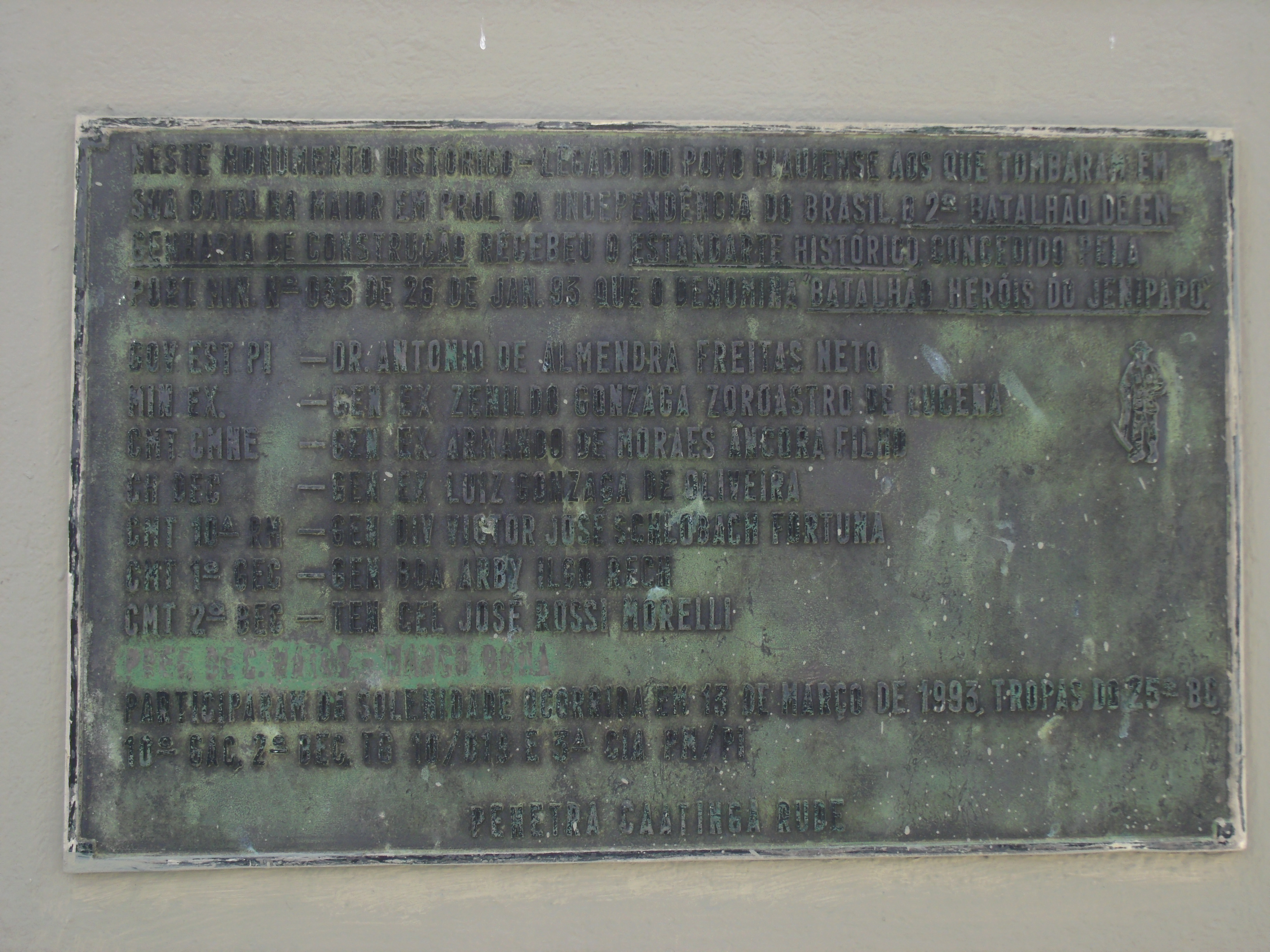 Placa com o nome do Ministro do Exercito, em 1993, Zenildo Gonzaga Zoroastro de Lucena no monumento da Batalha do Jenipapo, uma das lutas pela independencia do Brasil.